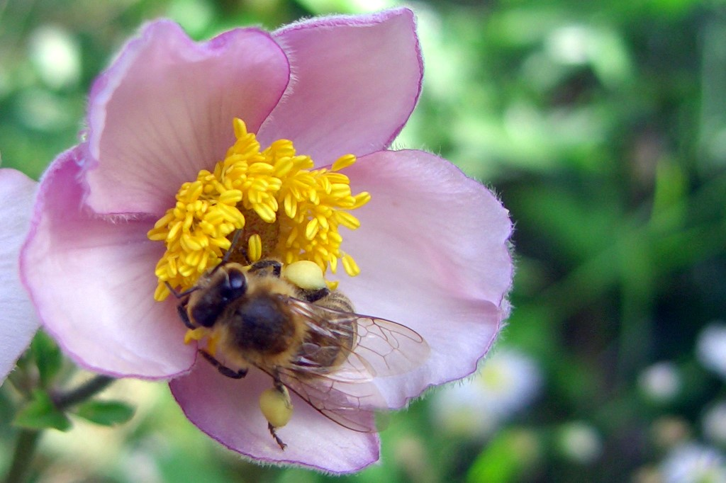 Bee collecting pollen in an anemone / Pollen sammelnde Biene in einer Anemonen Blüte